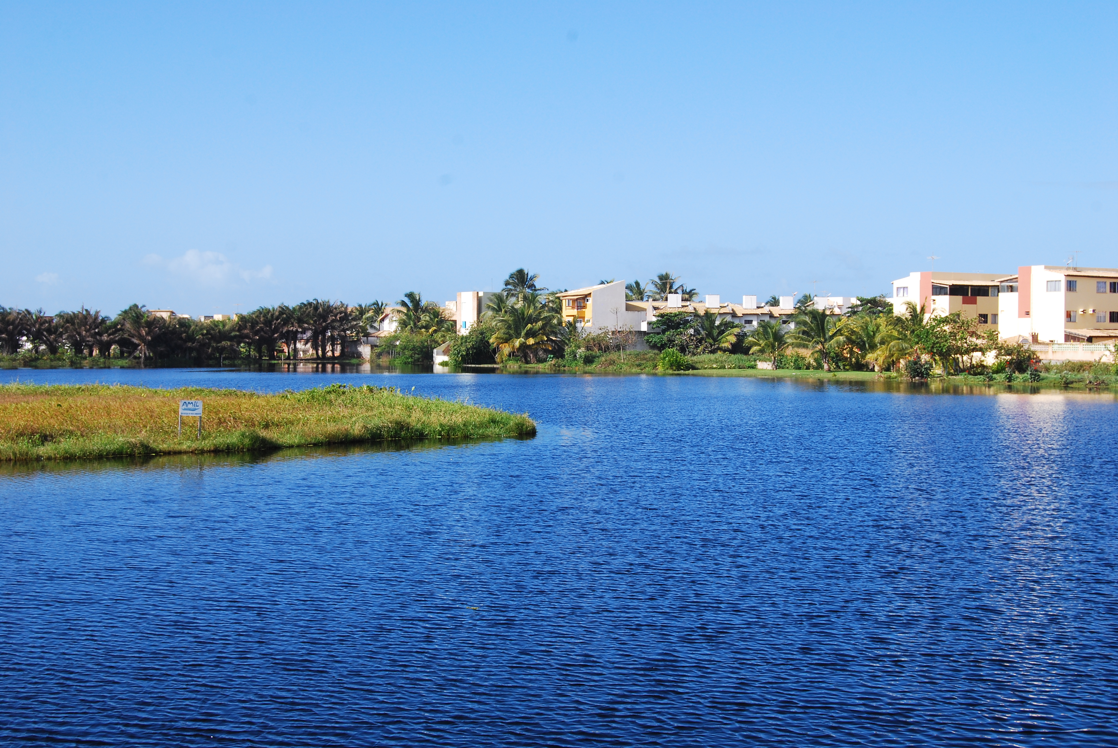 ipitanga 18